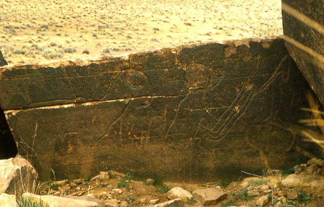 Gravures préhistoriques de la région d'El Bayadh, Algérie